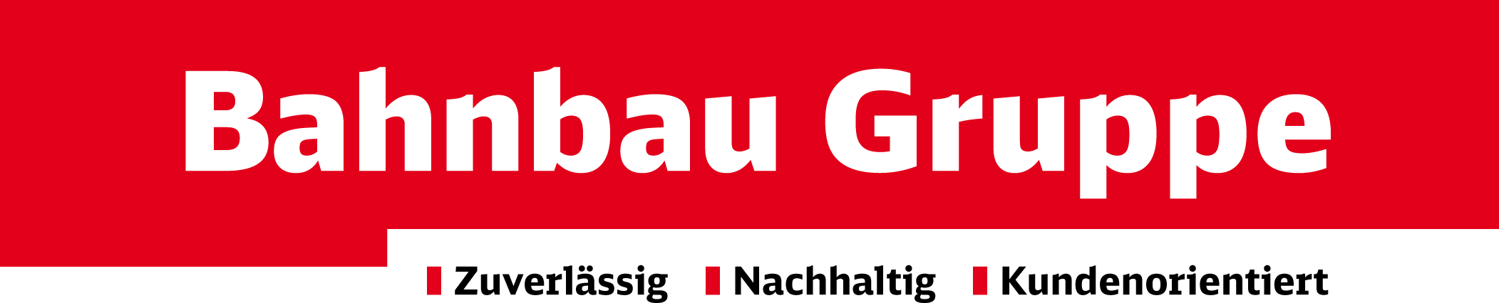 Winkelelement DB Bahnbau Gruppe 2014